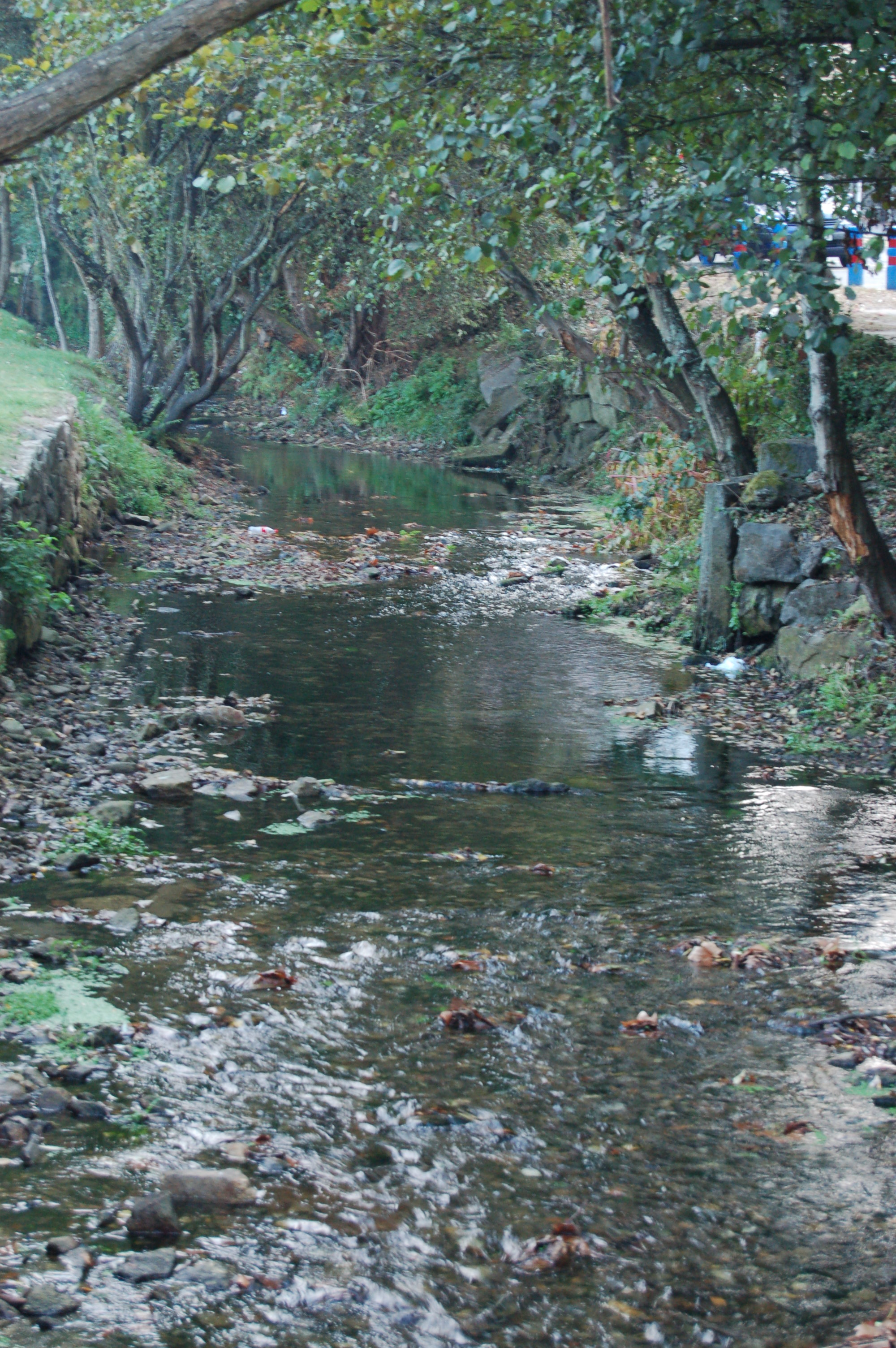 Río dos Gafos cerca do barrio pontevedrés de Campolongo